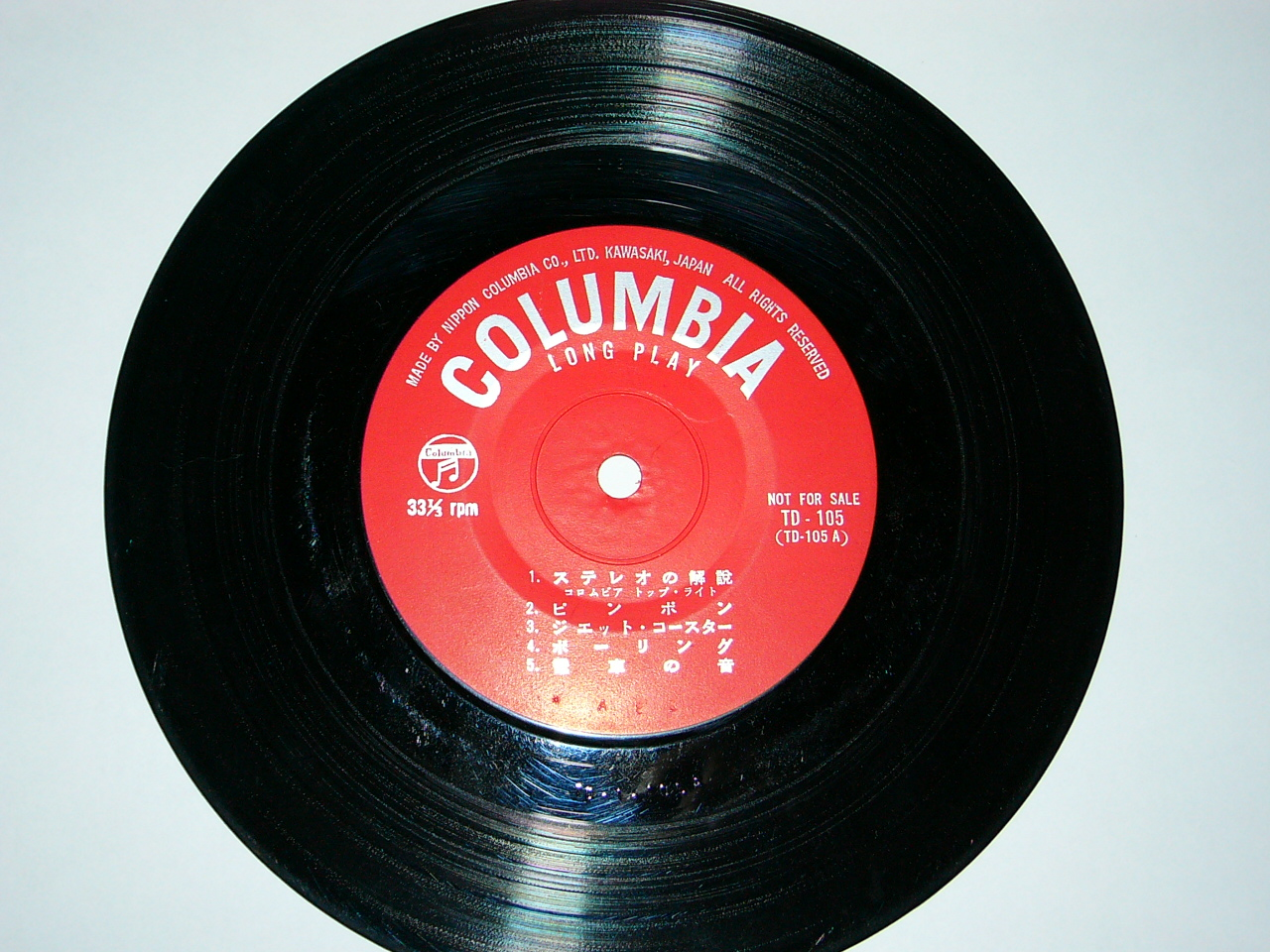 コンパクト盤。初期のステレオコンポに付属していたデモンストレーション盤。内容は、各効果音や音楽がステレオ収録されているというもの。